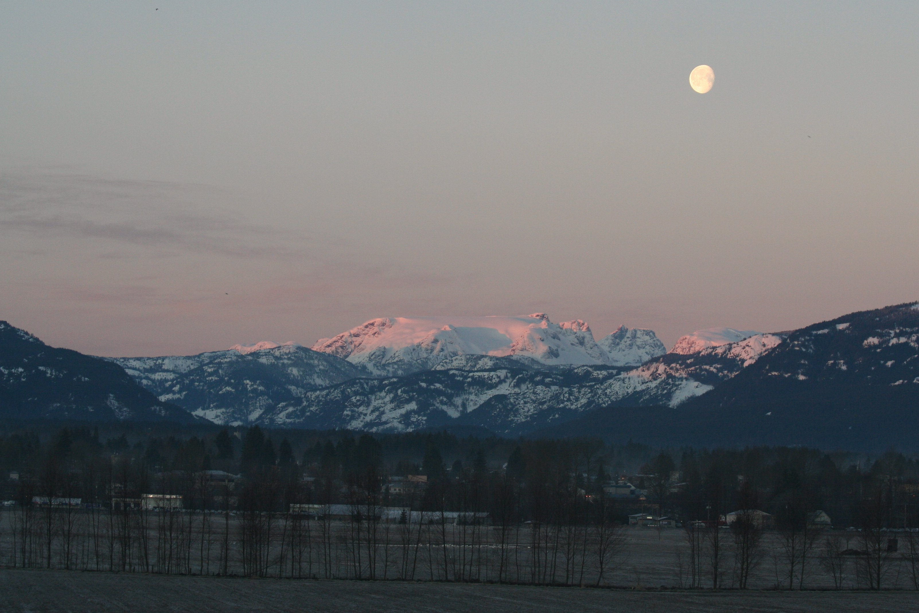 Comox Glacier